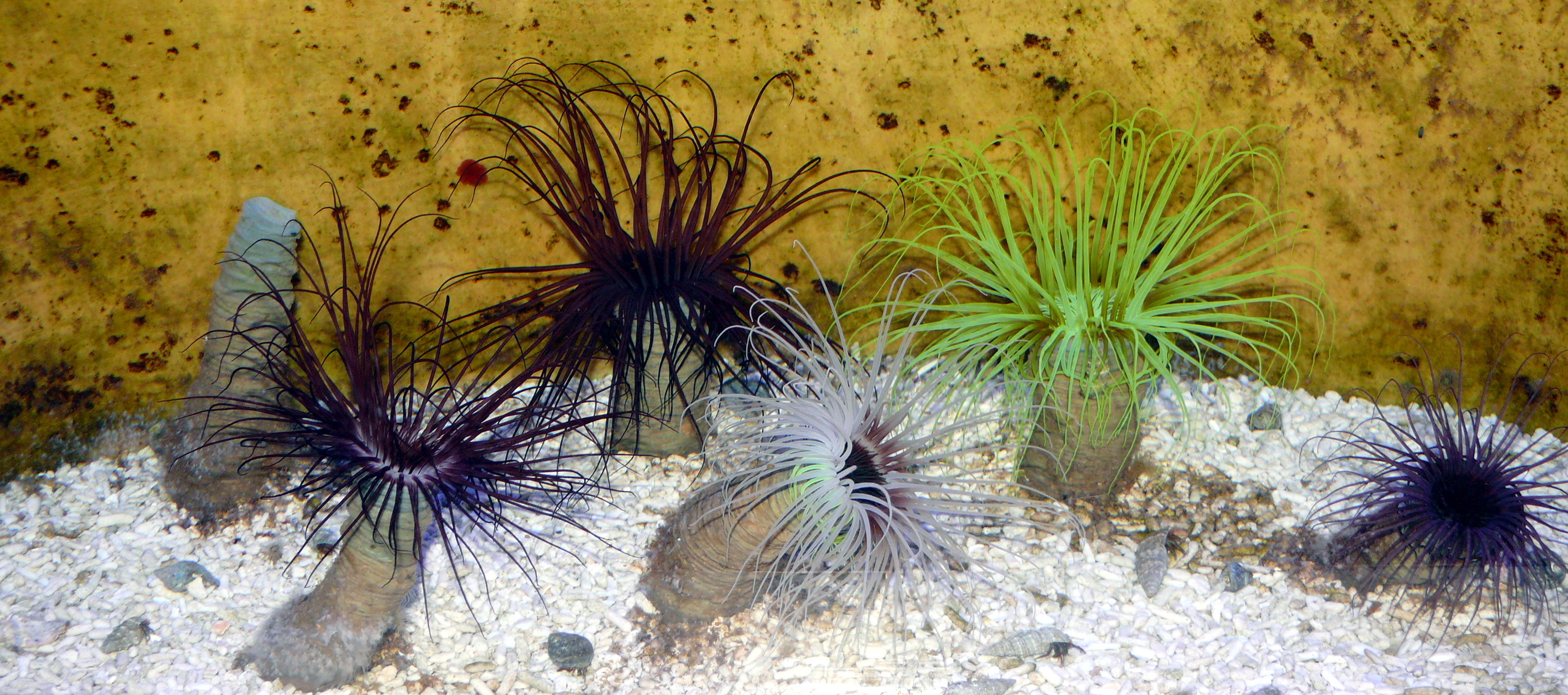 Mittelmeer-Zylinderrose (Ceriantharia_membranacea)